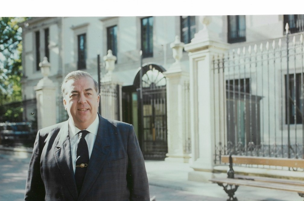 Don Jesús María de Viana. El 30 de Noviembre de 1.986 se presento a las elecciones autonómicas a Lendakari por el CDS. La foto esta realizada el día 15 de Noviembre de ese año. Ya había sido consejero de obras publicas y viviendas en el consejo general vasco.